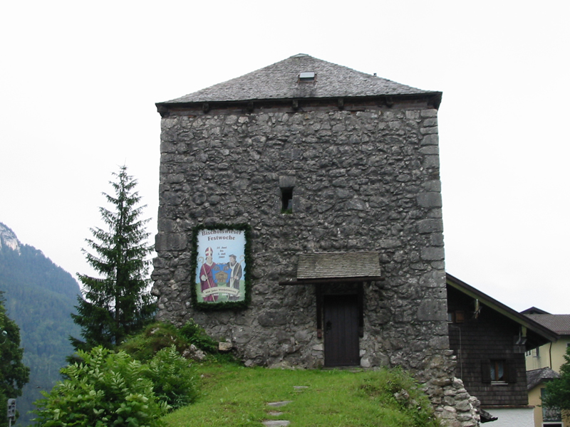 Überreste des Wehrturms am Pass Hallthurm.